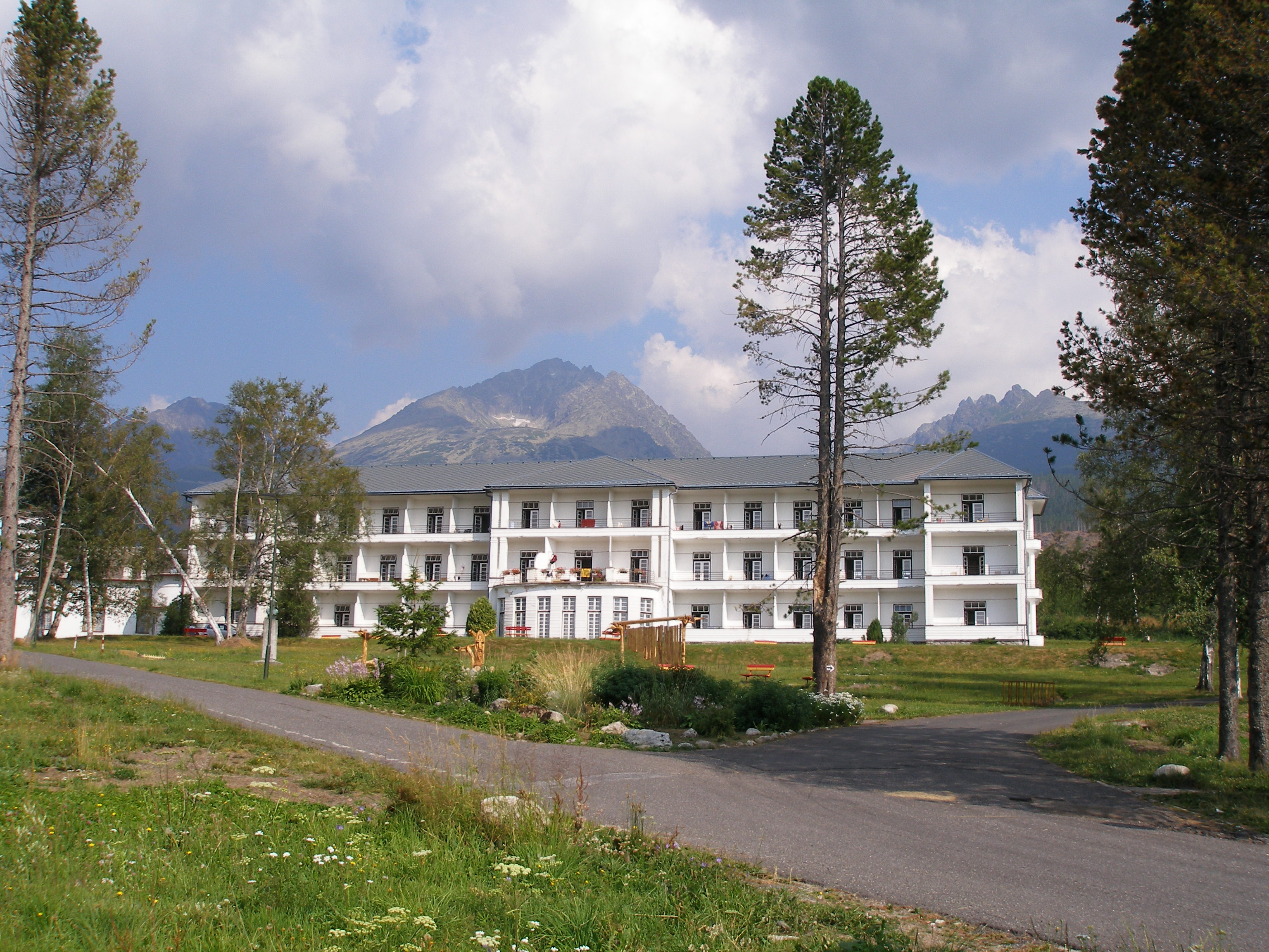 Osada Tatranská Polianka, Slovakia